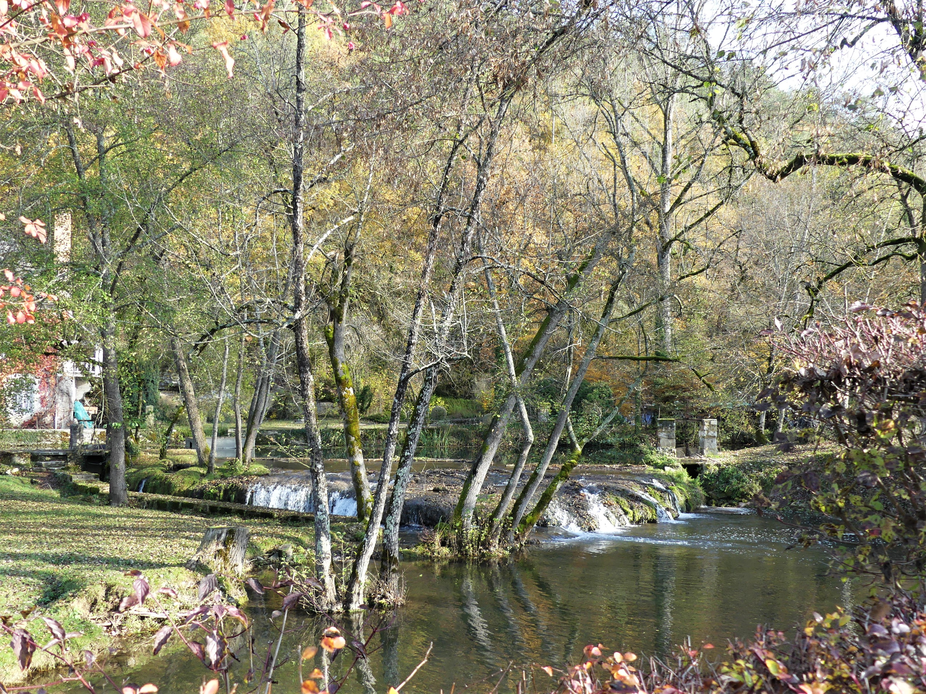 Le Coly au pied du manoir d'Hautegente, Coly, Dordogne, France. Vue prise en direction de l'amont.